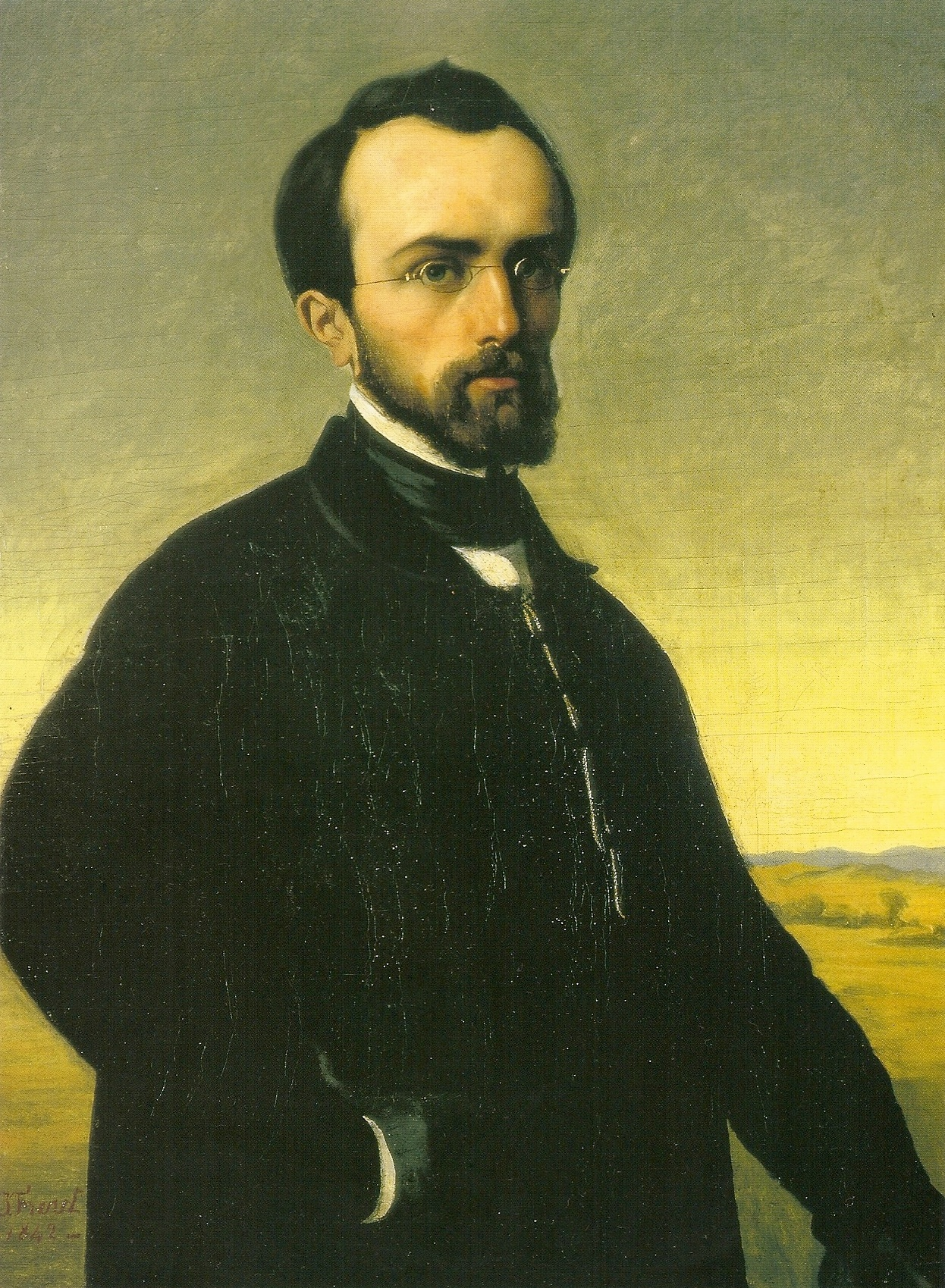 Self-portrait